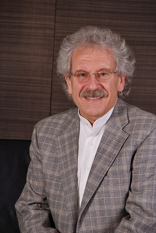 Heinrich Aller, Landtagsabgeordneter Niedersachsen, 16. Wahlperiode (Fotoprojekt Landtagsabgeordnete Niedersachsen am 24. und 25. November 2009)